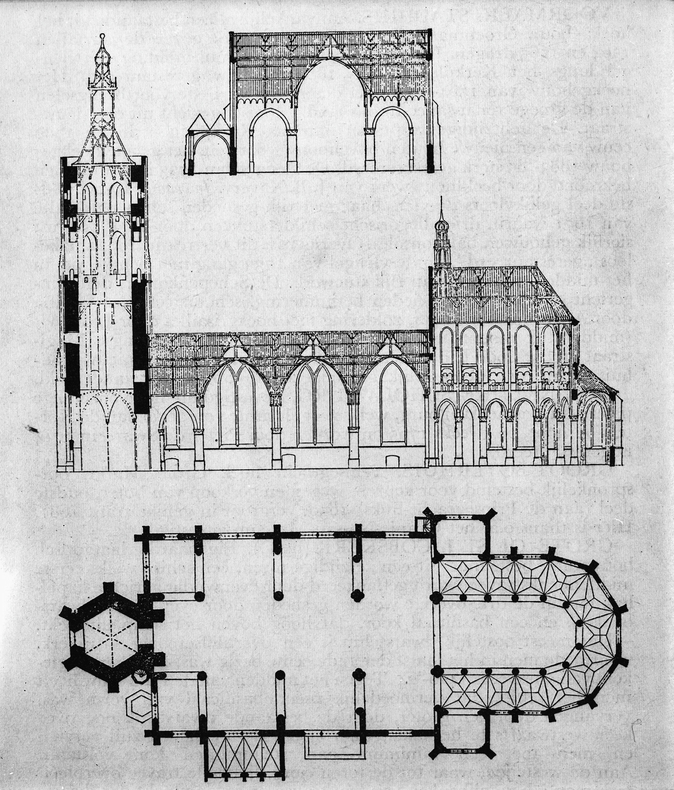 Sint Jacobskerk: plattegrond en doorsneden